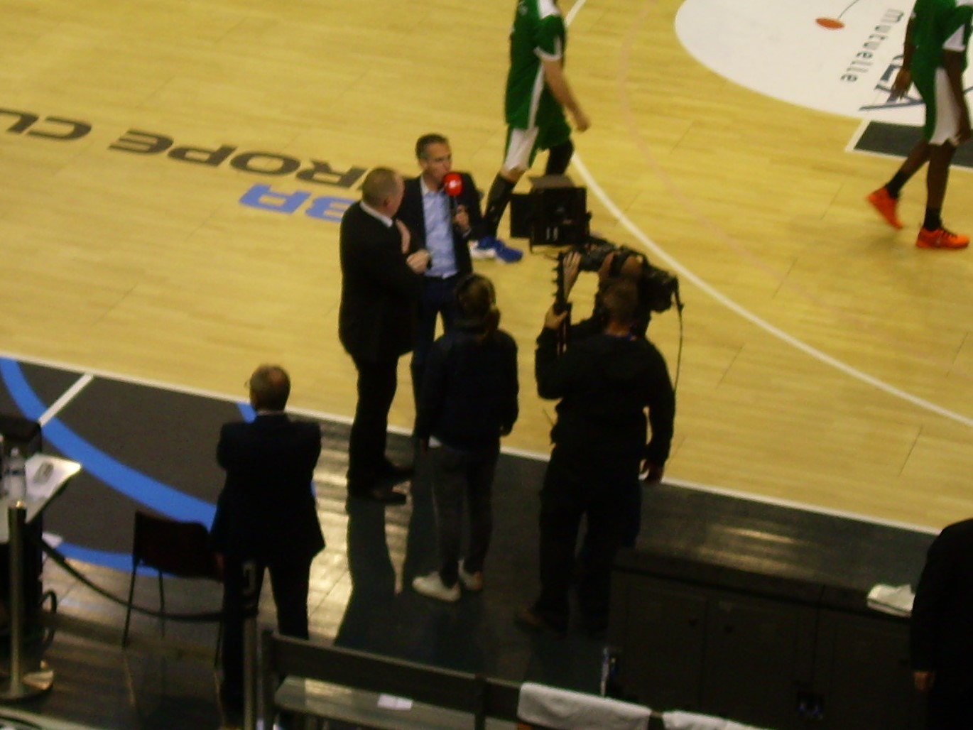 Finale aller de la Coupe d'Europe FIBA 2016-2017 au Colisée entre l'Elan Chalon et Nanterre. Interwiew a la mi-temps par la télévision.